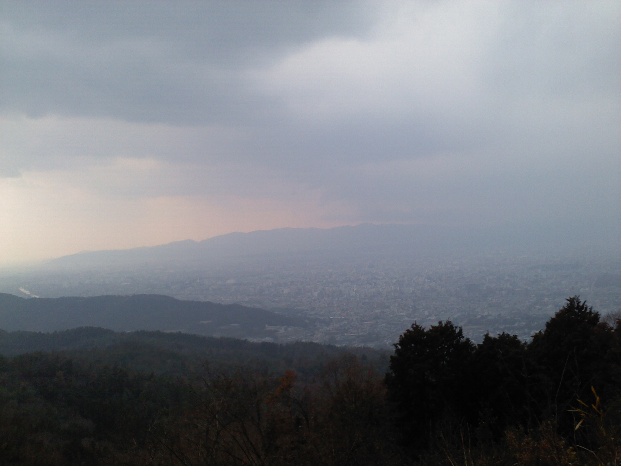 大文字山山頂からの景色。おおよそ南西、京都駅・京都タワー方向。